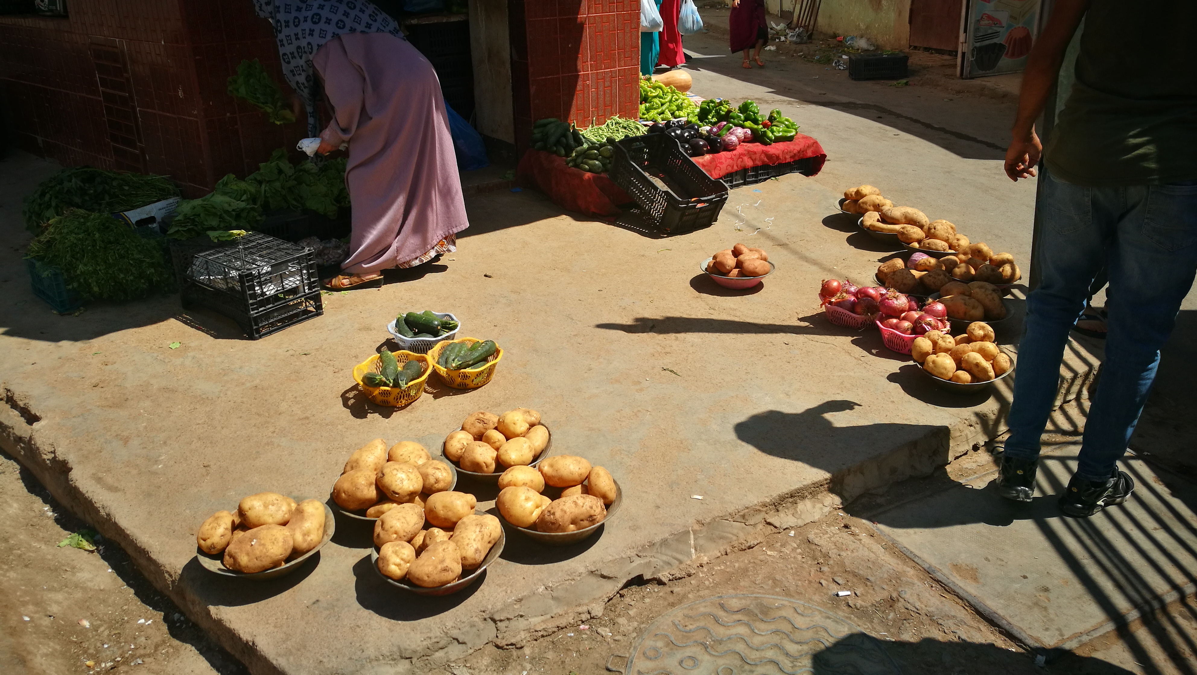 Algerie - Culture - Algeria - Photography - Cuisine - Plage - Architecture